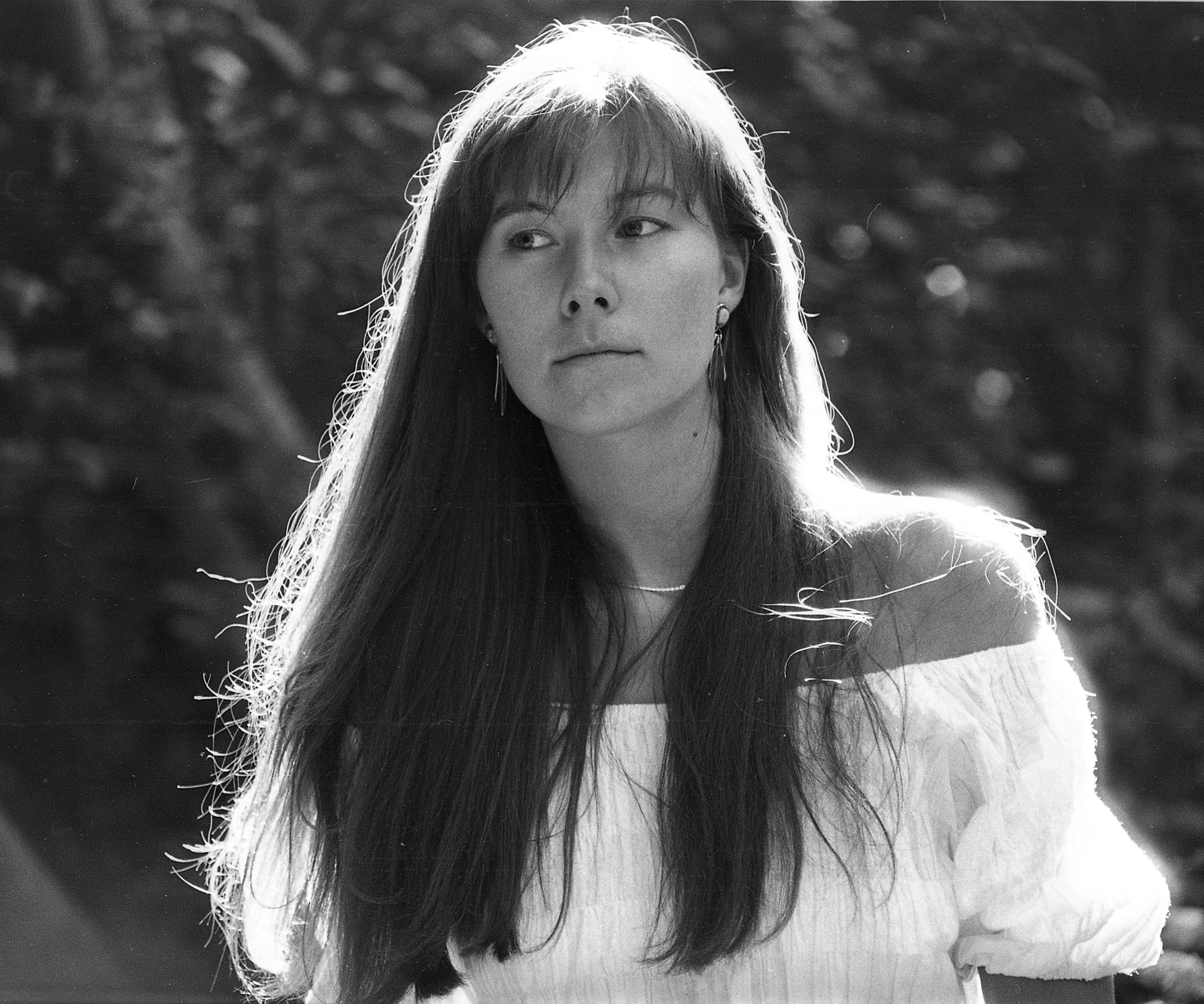 Viive Aasma 1989. aastal